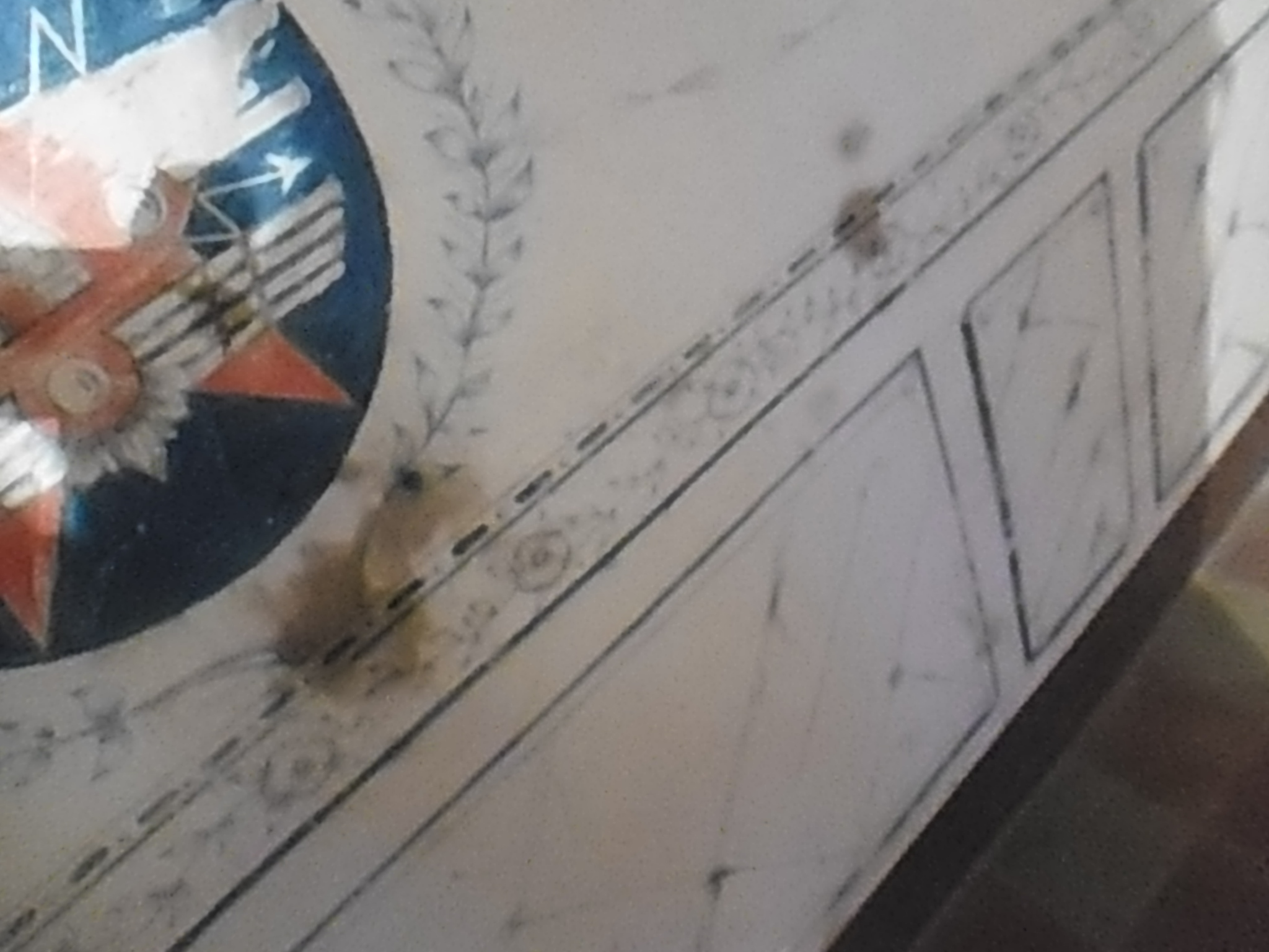 Sirvió de escondite republicano donde se refugiaban los pertenecientes al hospital (hoy Palacio de los Condes de Ayala) en Castuera, durante la Guerra Civil.